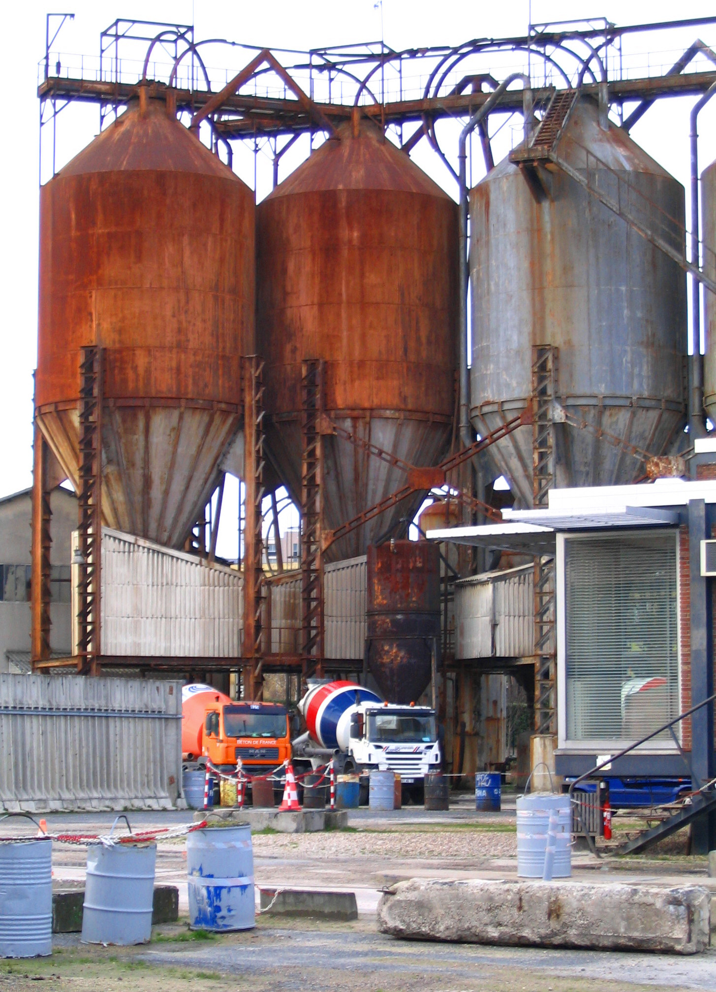 Silos à ciment - Viry-Chatillon - France Auteur/author: P.Charpiat